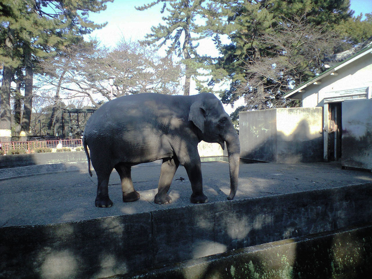 神奈川県小田原市城内、小田原城址公園、インドゾウ、ウメ子（1947?-2009）